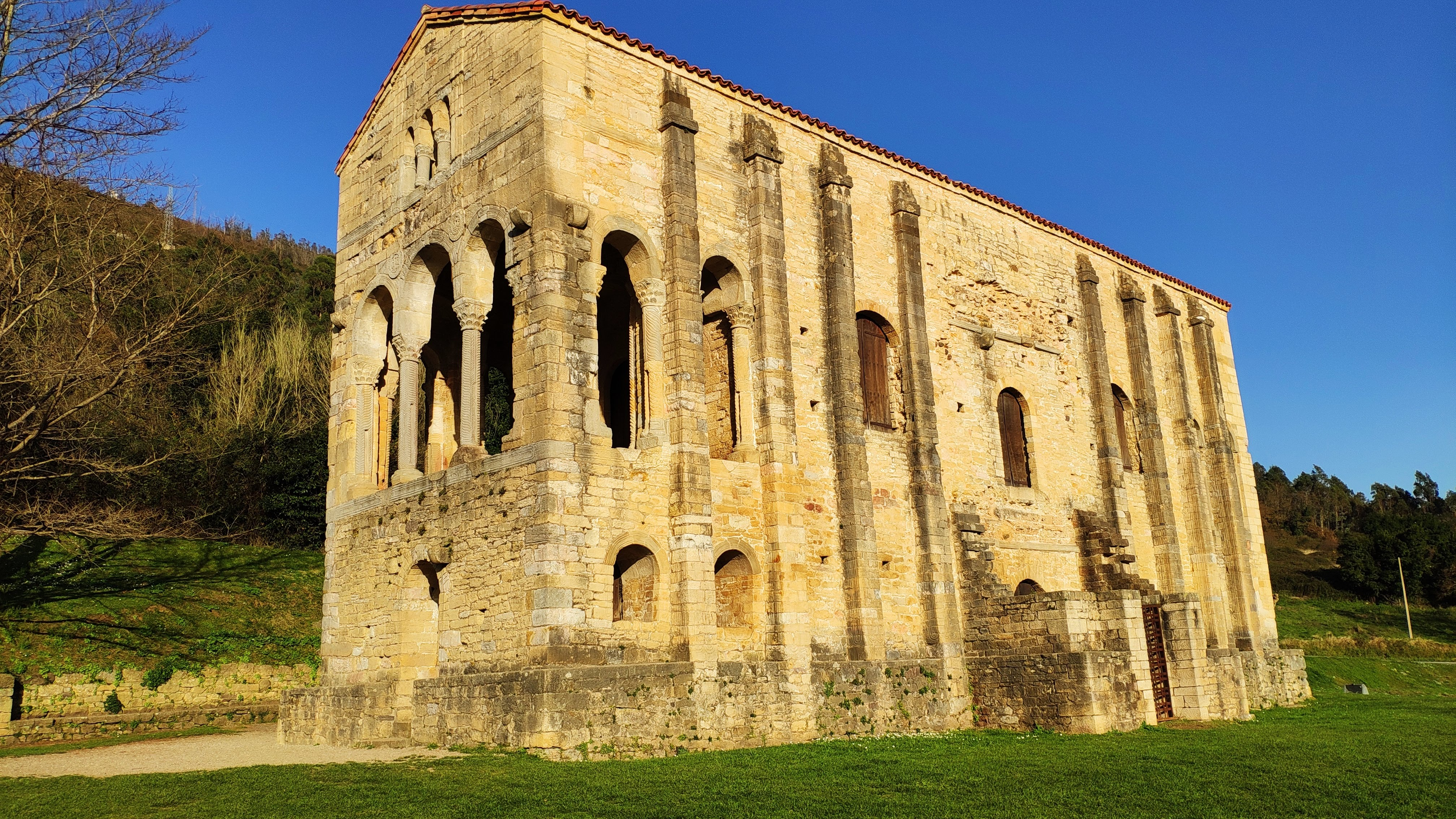 Santa María del Naranco, Oviedo (2018)